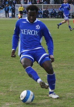 Cícero